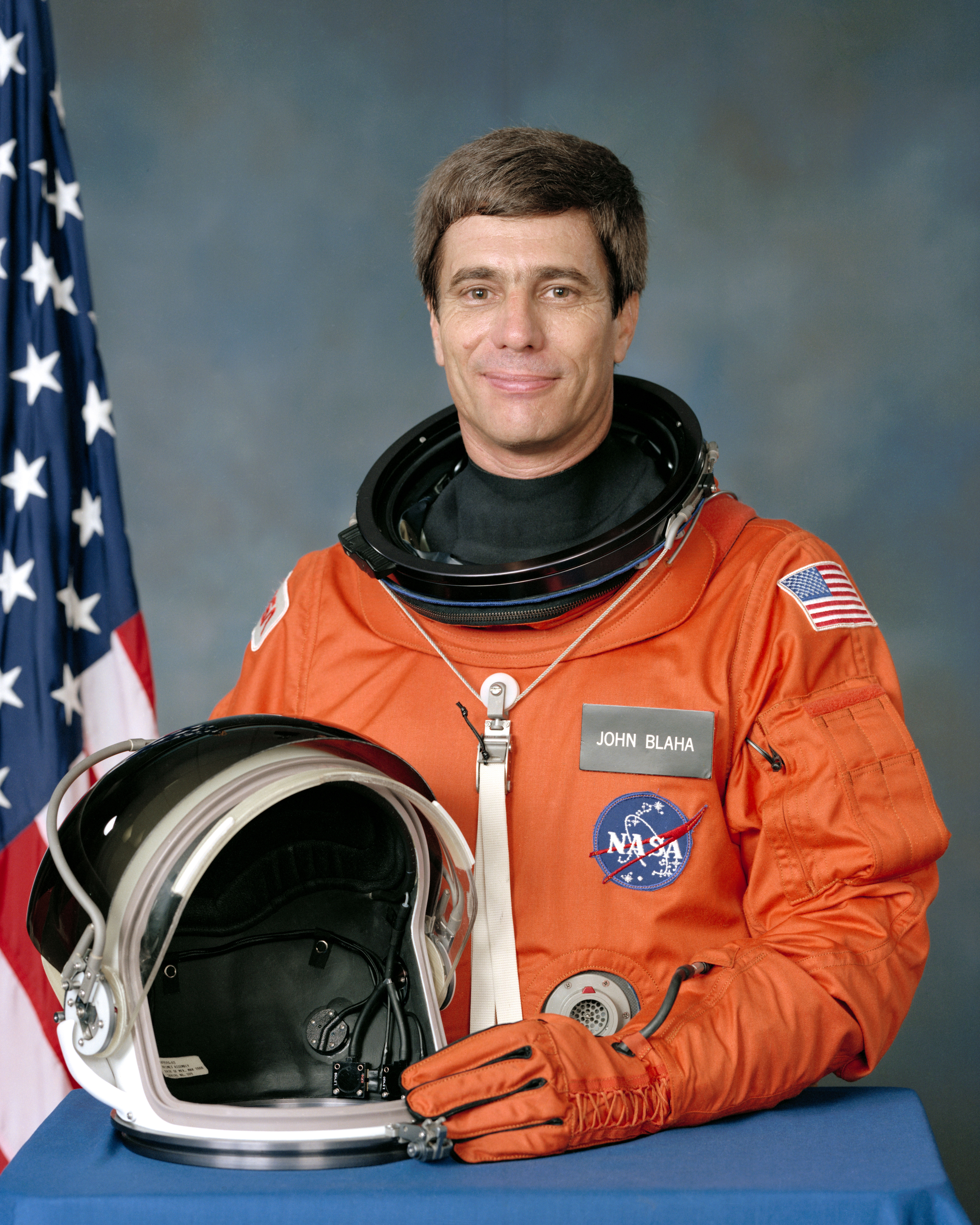 John Elmer Blaha (US Astronaut)